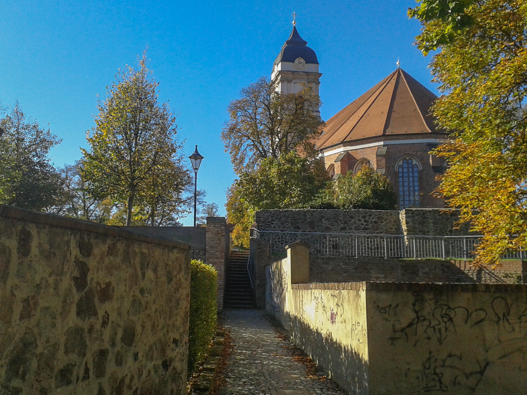 Die Katzentreppe am Dom als historischer Durchlass der Stadtmauer.